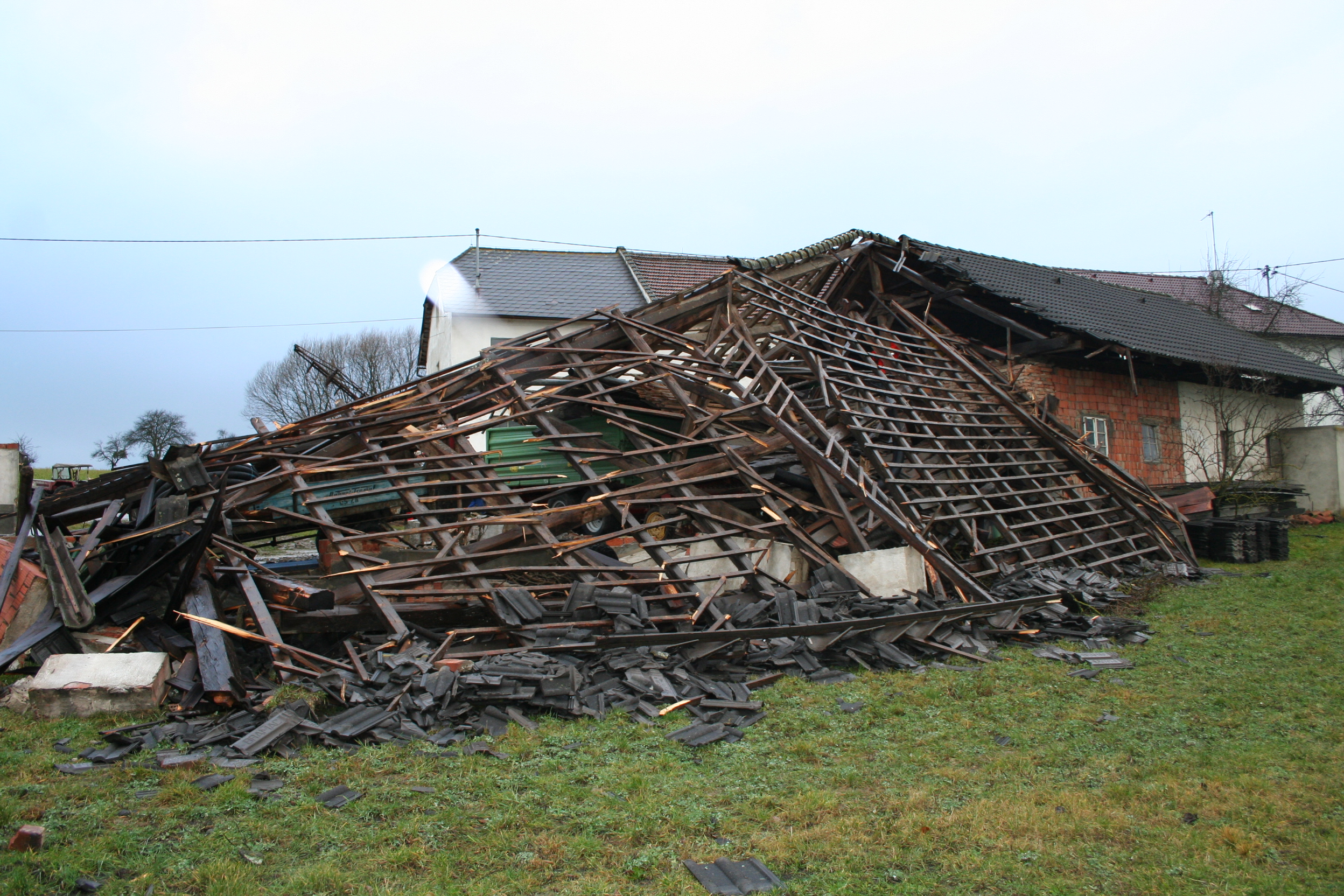 Zerstörte Maschinenhalle in der Gemeinde St. Georgen / Gusen (Österreich)